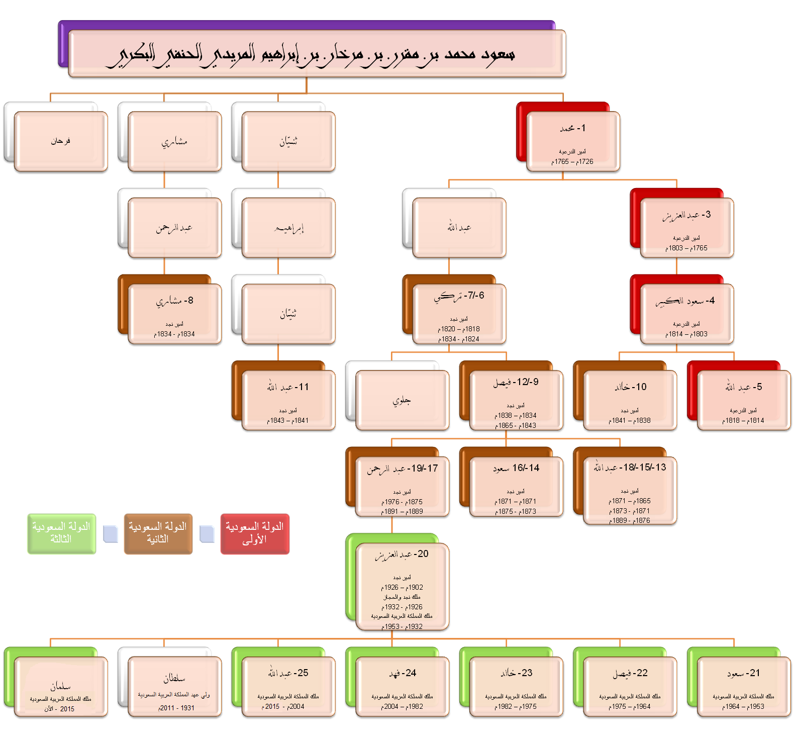 عائلة آل سعود